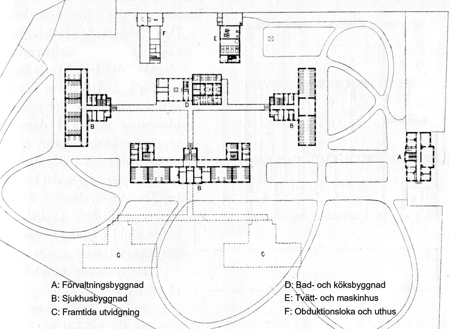 Planritning för Sankt Görnas sjukhus omkring 1897